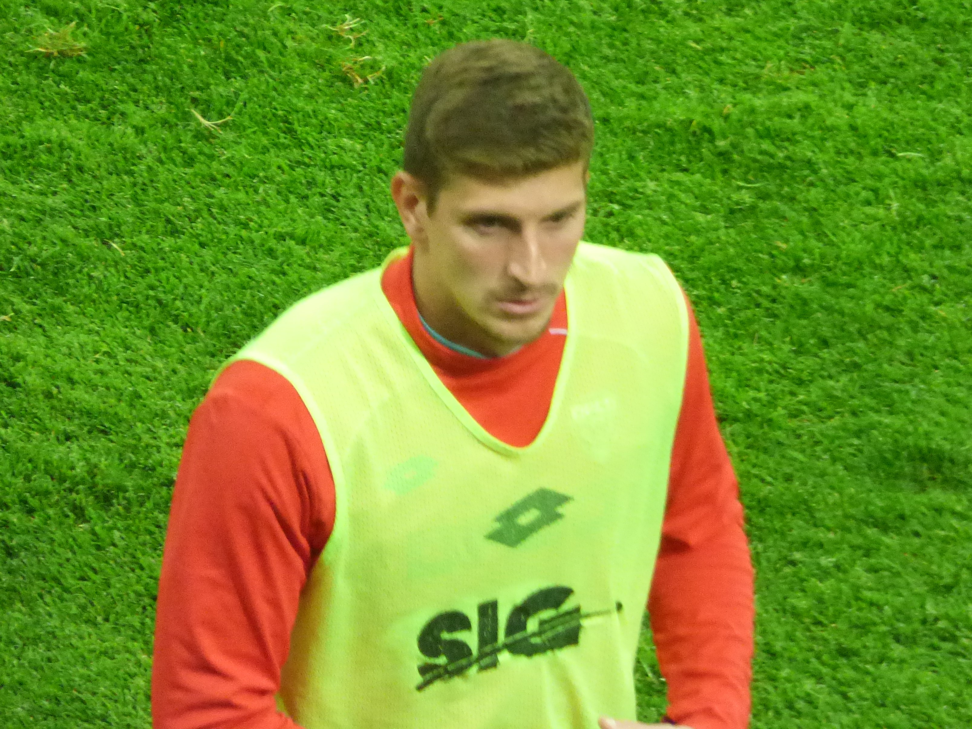 Bobby Allain après le match RC Lens / Dijon FCO, match aller des barrages pour la montée en Ligue 1 2018-2019, le 30 juin 2019, au Stade Bollaert-Delelis.